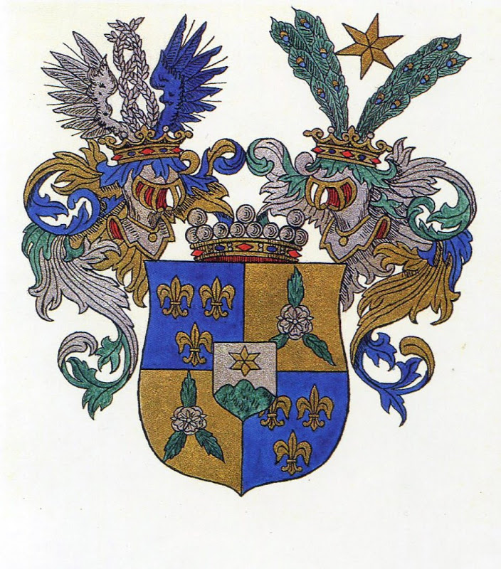 Герб рода Унгерн фон Штернберг